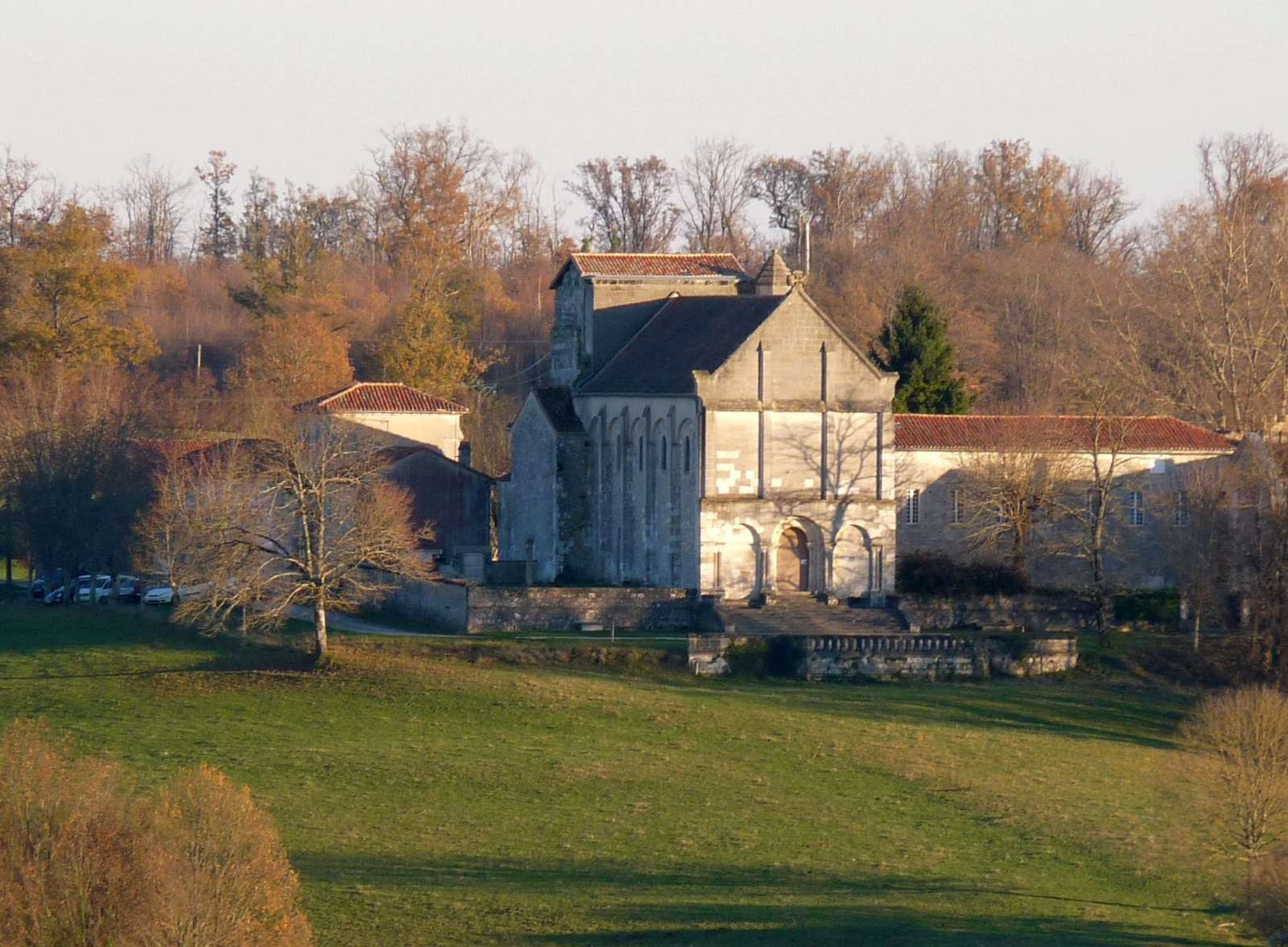 abbaye de Puypéroux, Aignes-et-Puypéroux, Charente, France